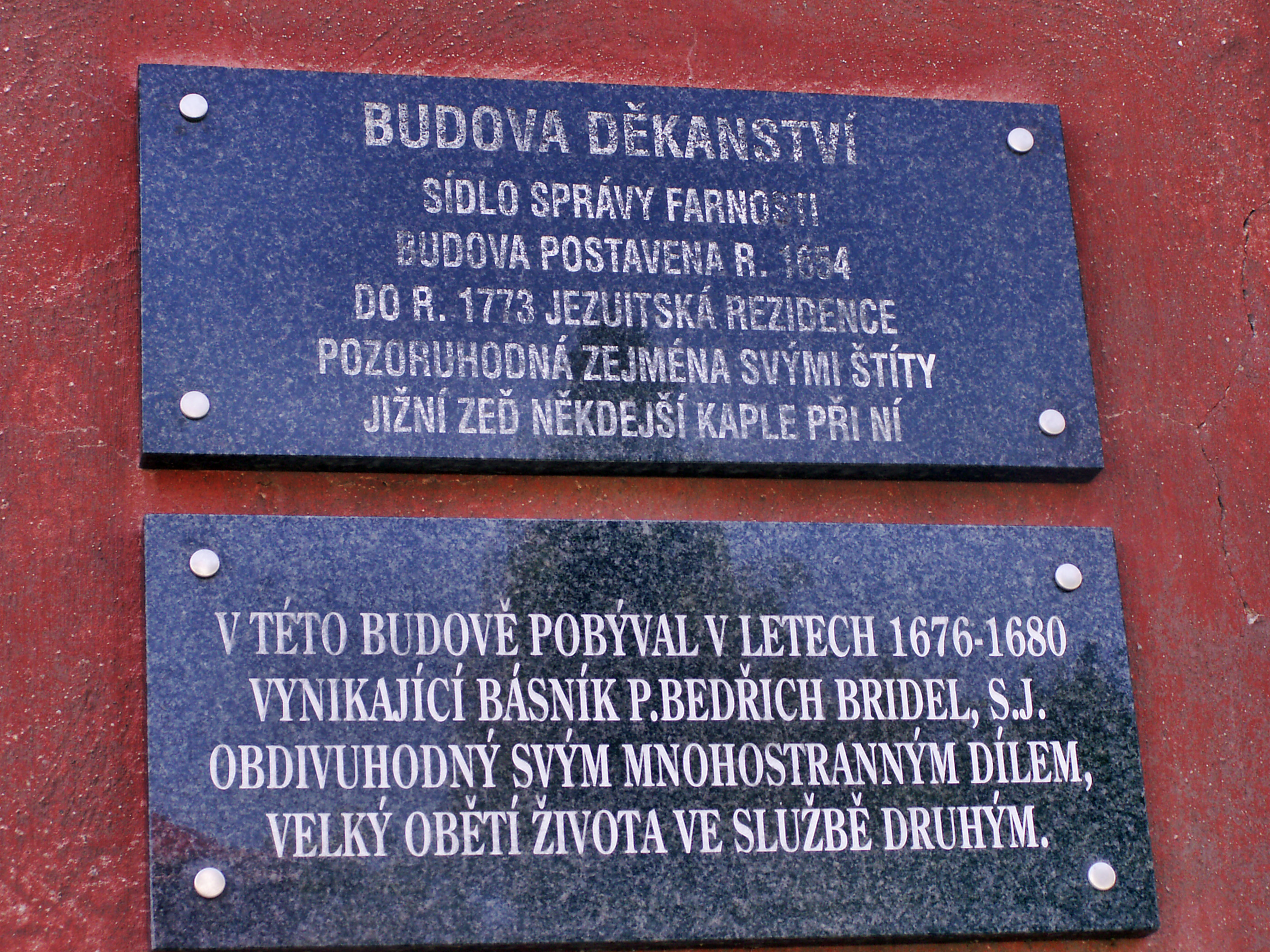 Golčův Jeníkov, okres Kutná Hora, pamětní deska na pobyt Bedřicha Briedela (na děkanství)